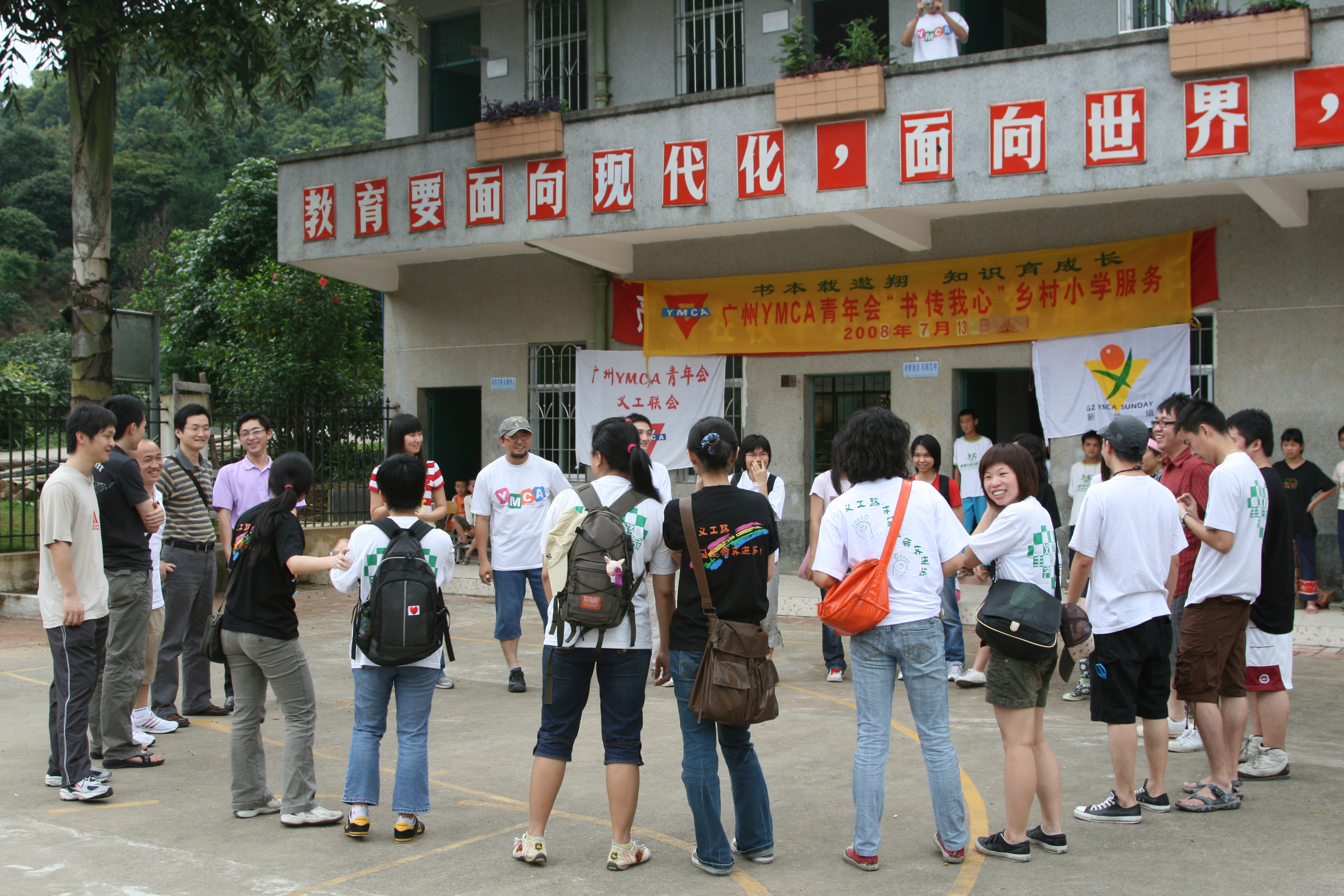 广州YMCA在参与活动